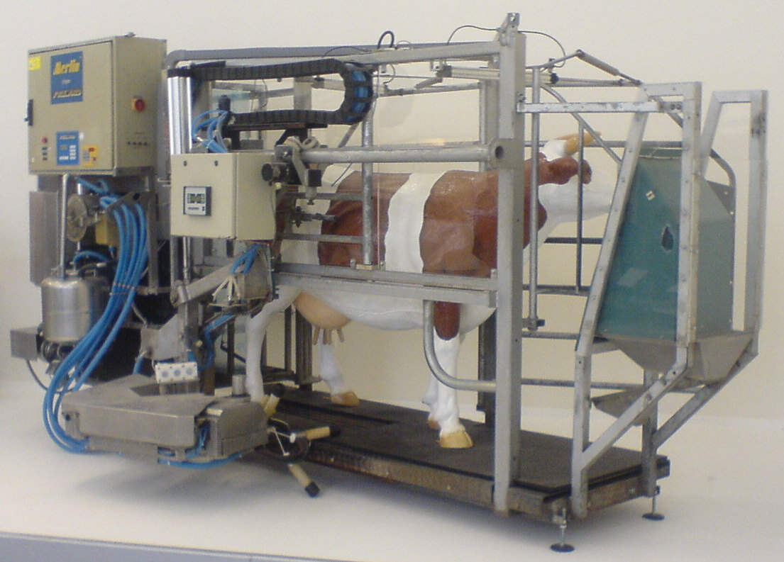 Vollautomatisches Melksystem; Hersteller: Merlin (Fullwood Packo Gruppe) — Exponat im Deutschen Museum München EG; Melkroboter